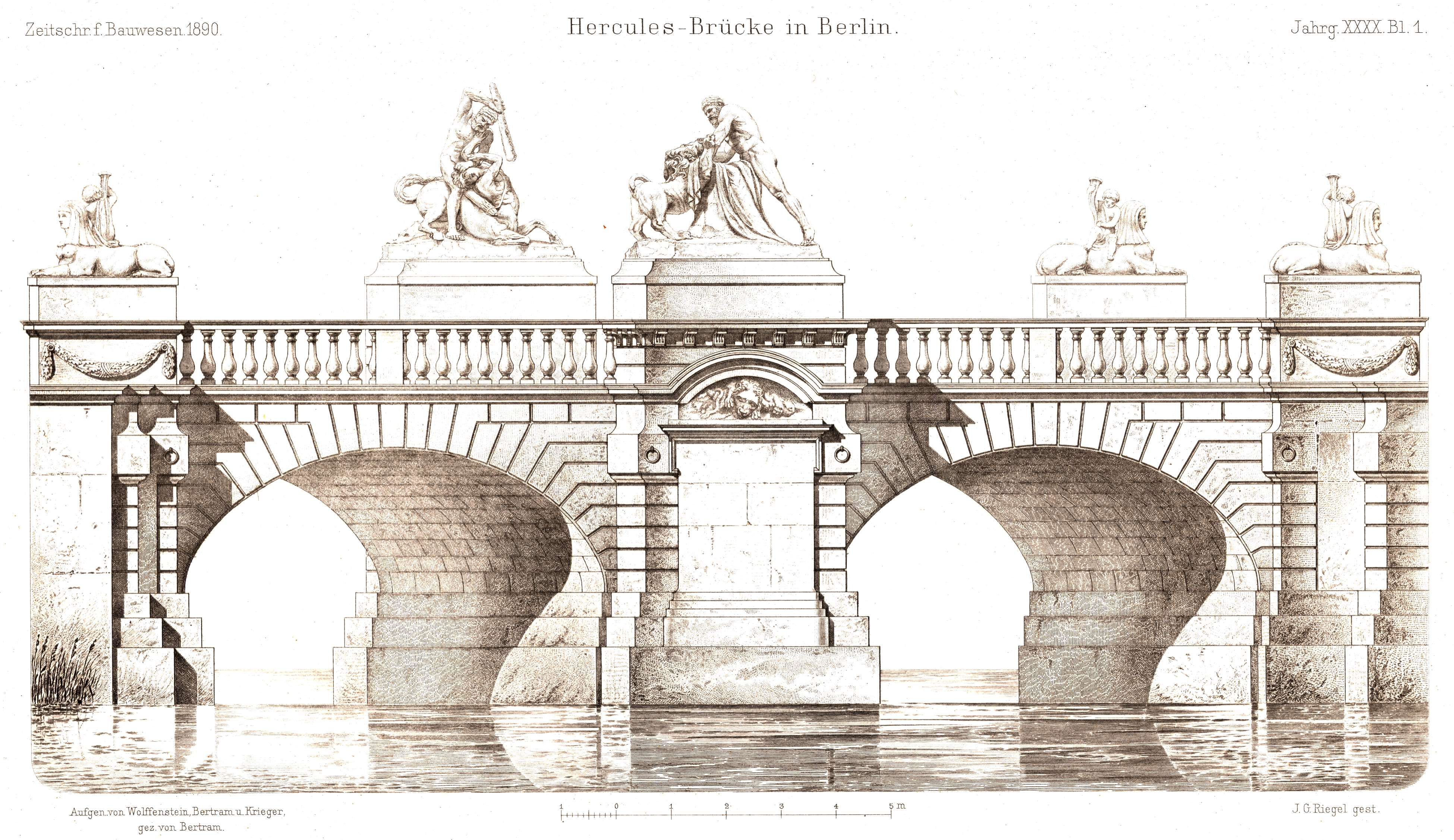 Berlin - Herkulesbrücke